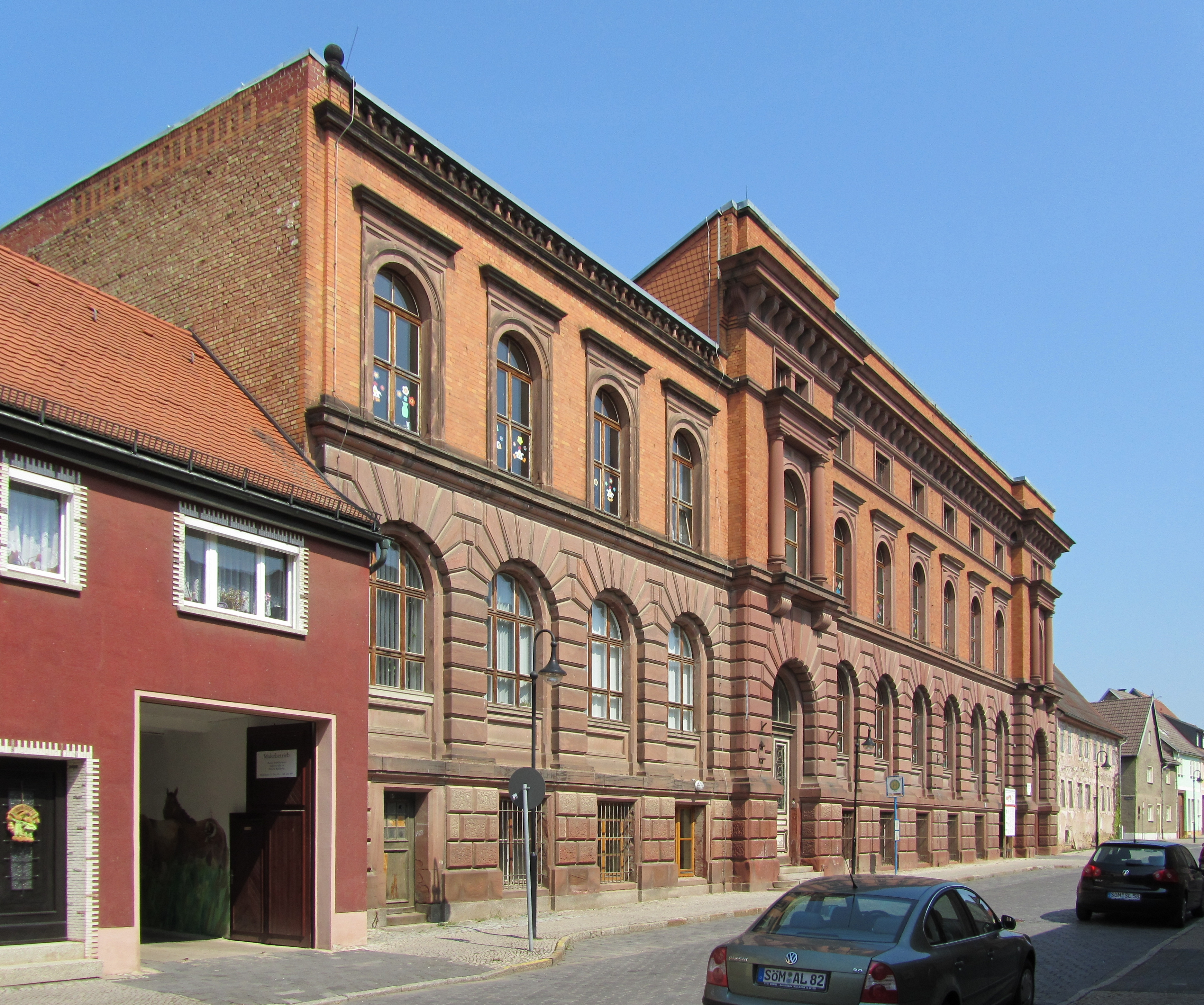 ehemliges Landratsamt in Kölleda (Thüringen); erbaut 1879–1880 nach Entwurf des Berliner Architekten Franz Schwechten; unter Denkmalschutz; heute durch die Wippertus Grundschule Kölleda genutzt